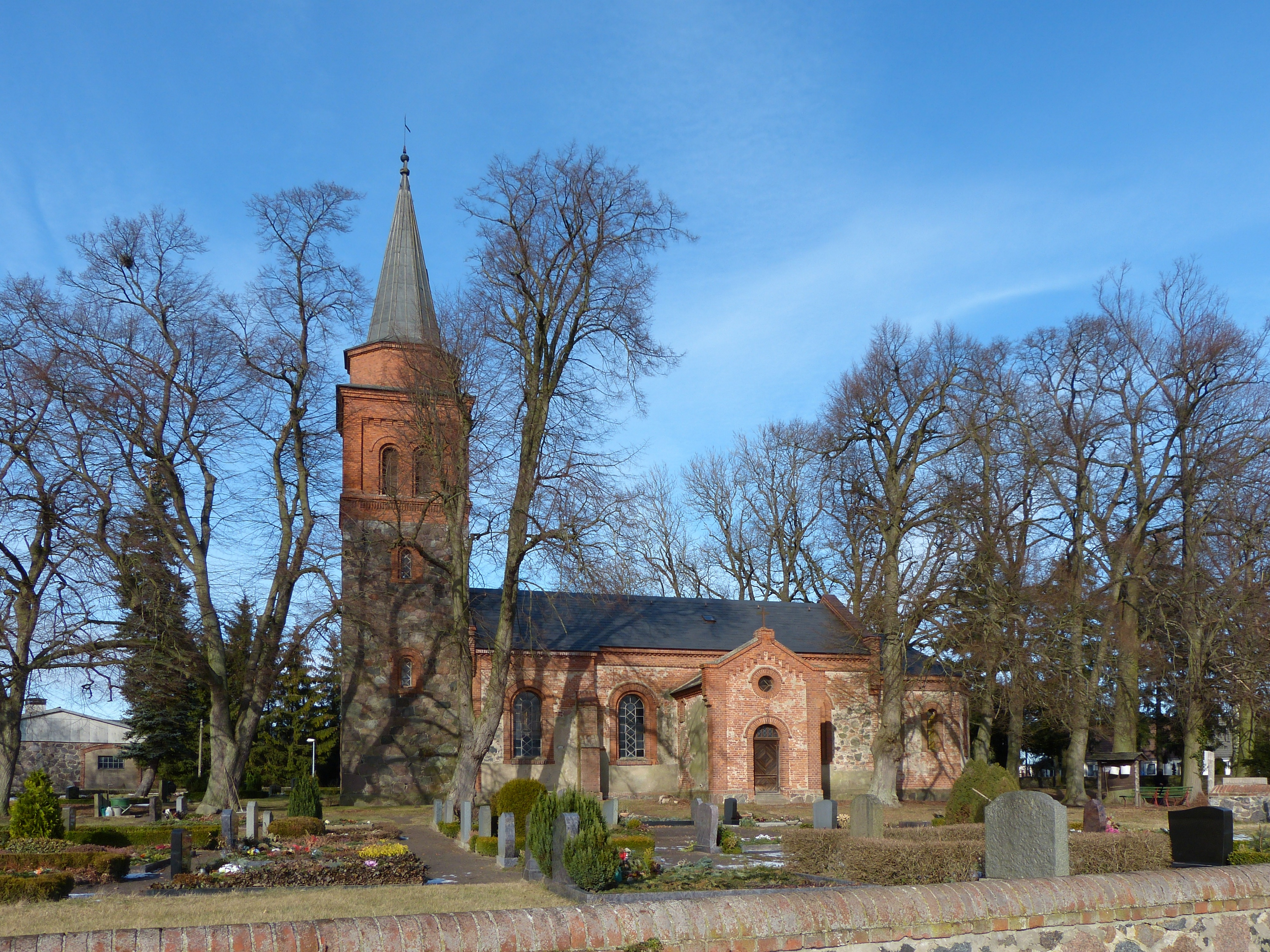 Kirche in Neuendorf B, Ansicht von Süden